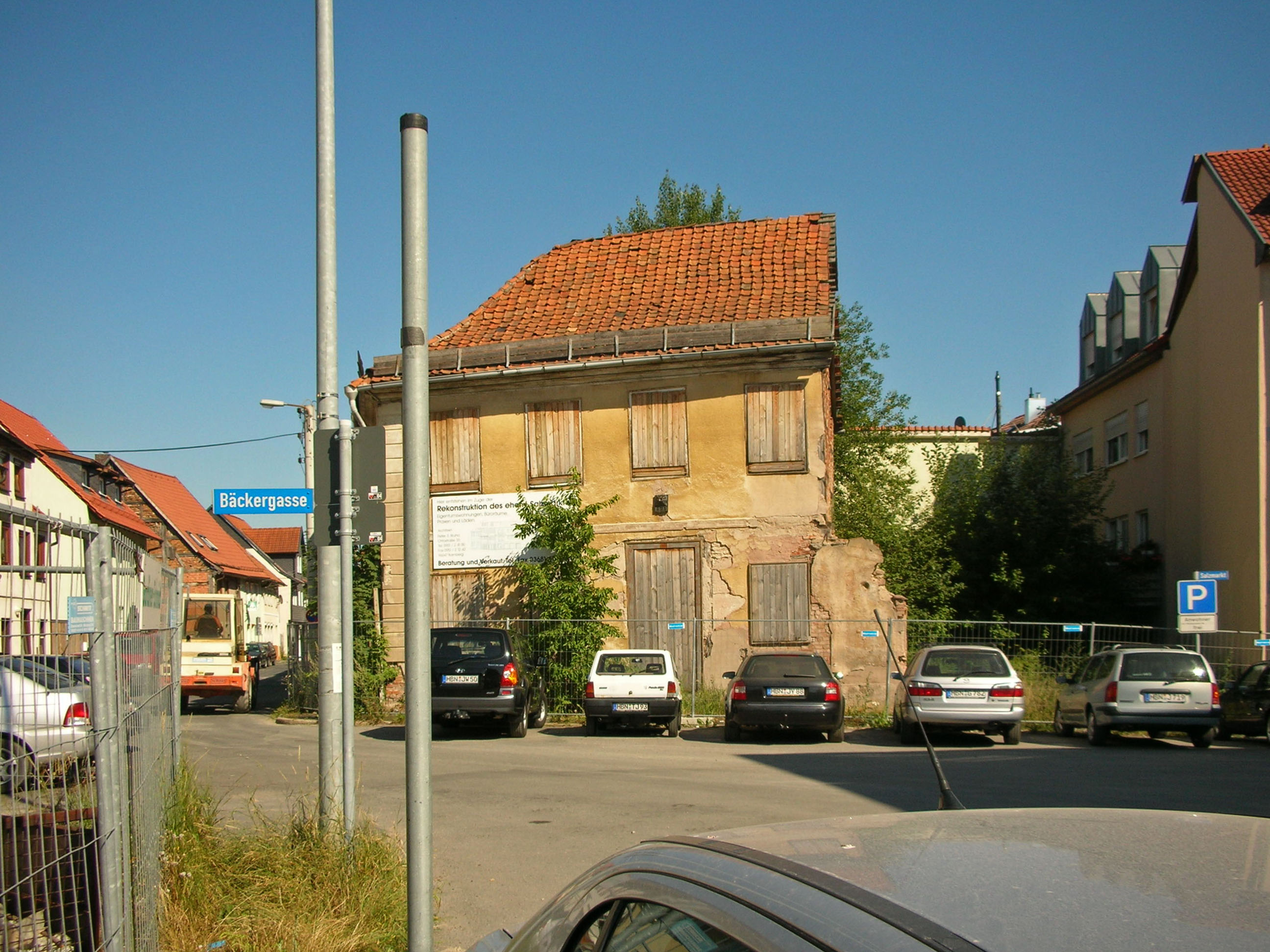 Hildburghausen, ehemaliger Salzmarkt